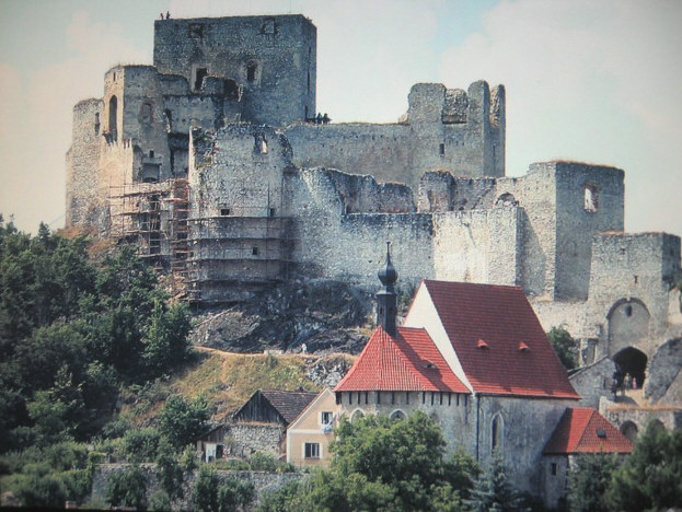 Rabí - la plej ampleksa burgruino en Ĉeĥio Kategorio:Bildoj de Ĉeĥio Kategorio:Burgoj